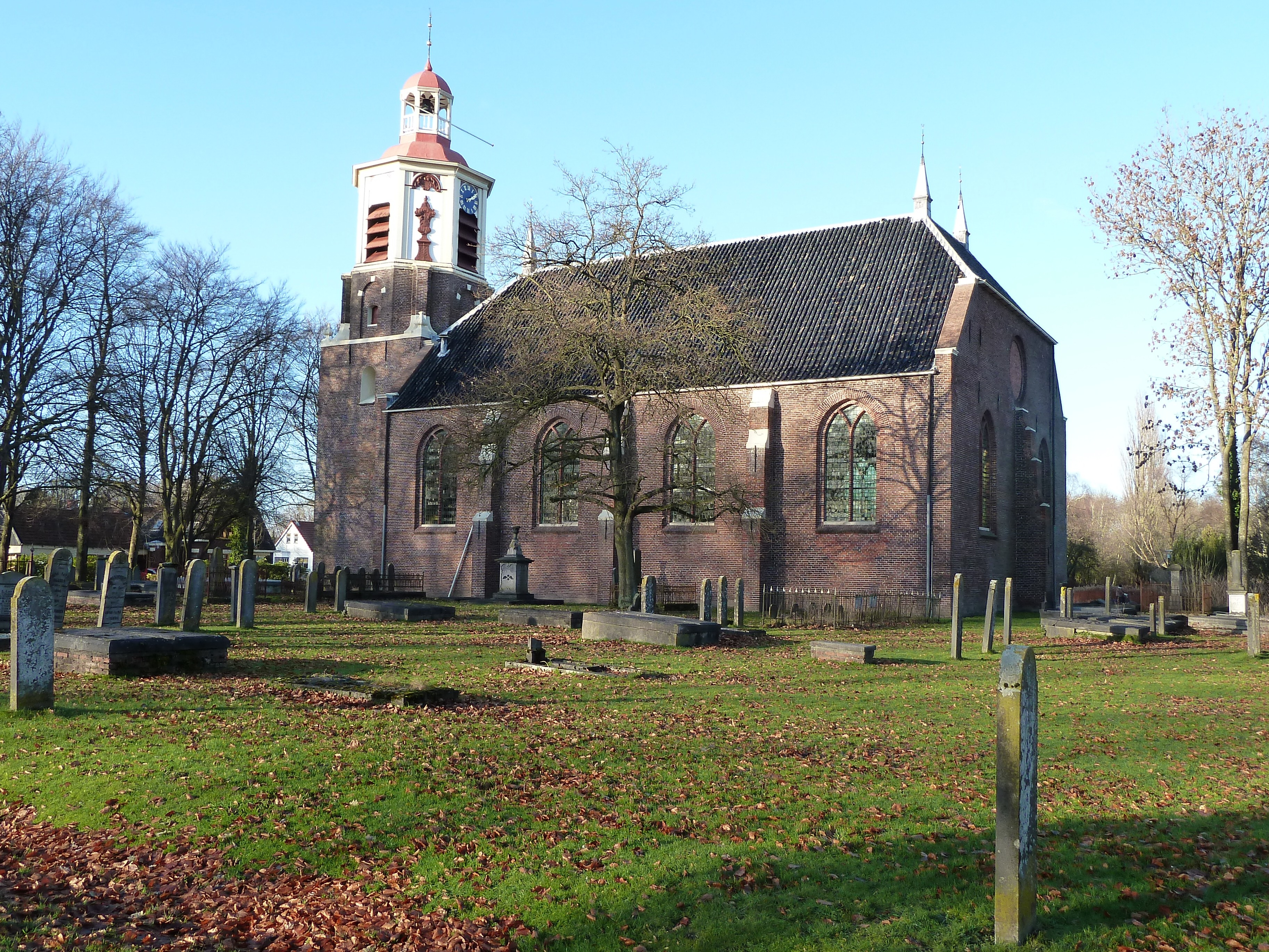 Hervormde kerk van het Groningse dorp Midwolda (1738, toren 1708)